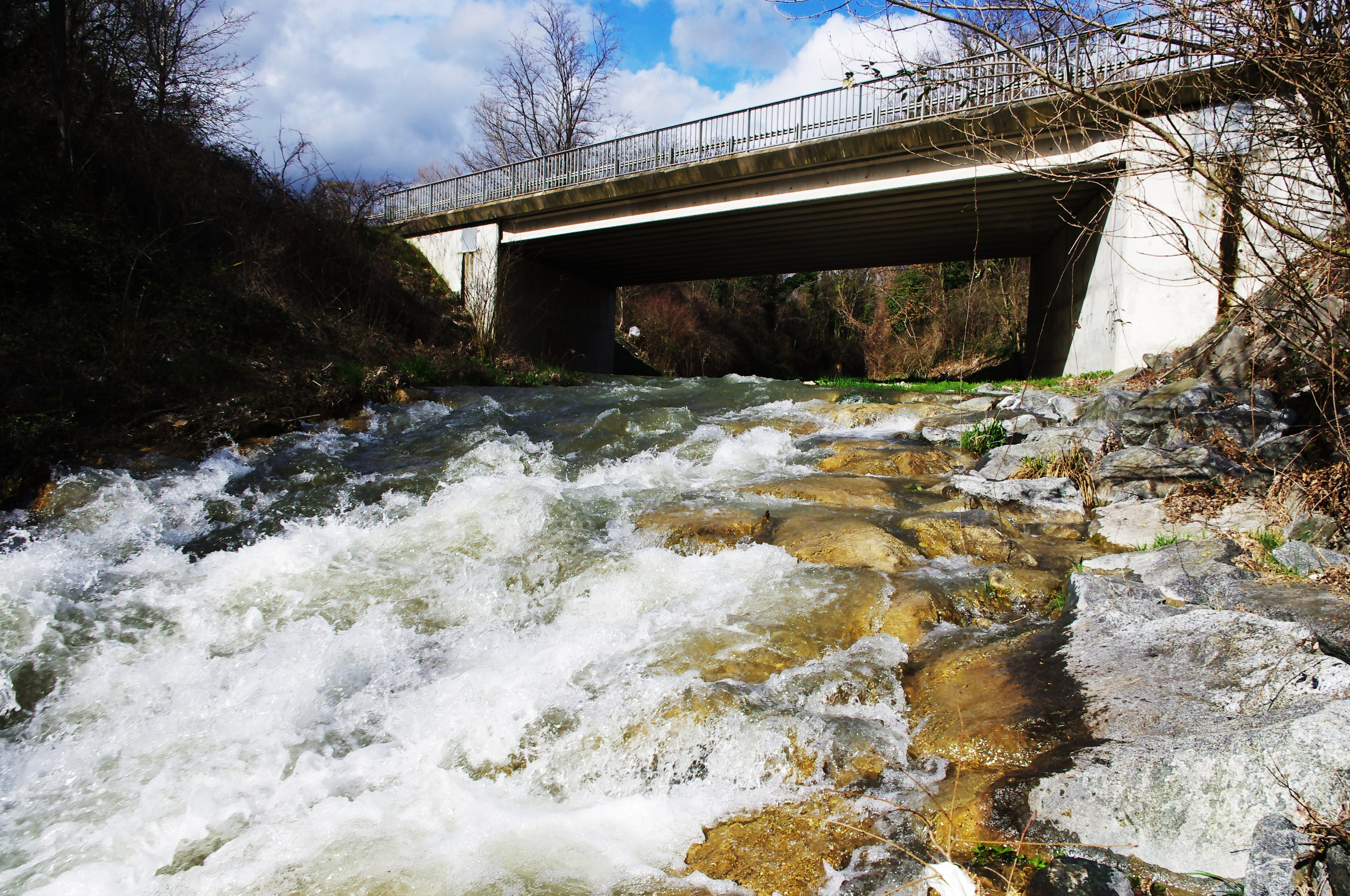 la Véore coulant sous le pont de la voie D538 en aval du bourg de Chabeuil